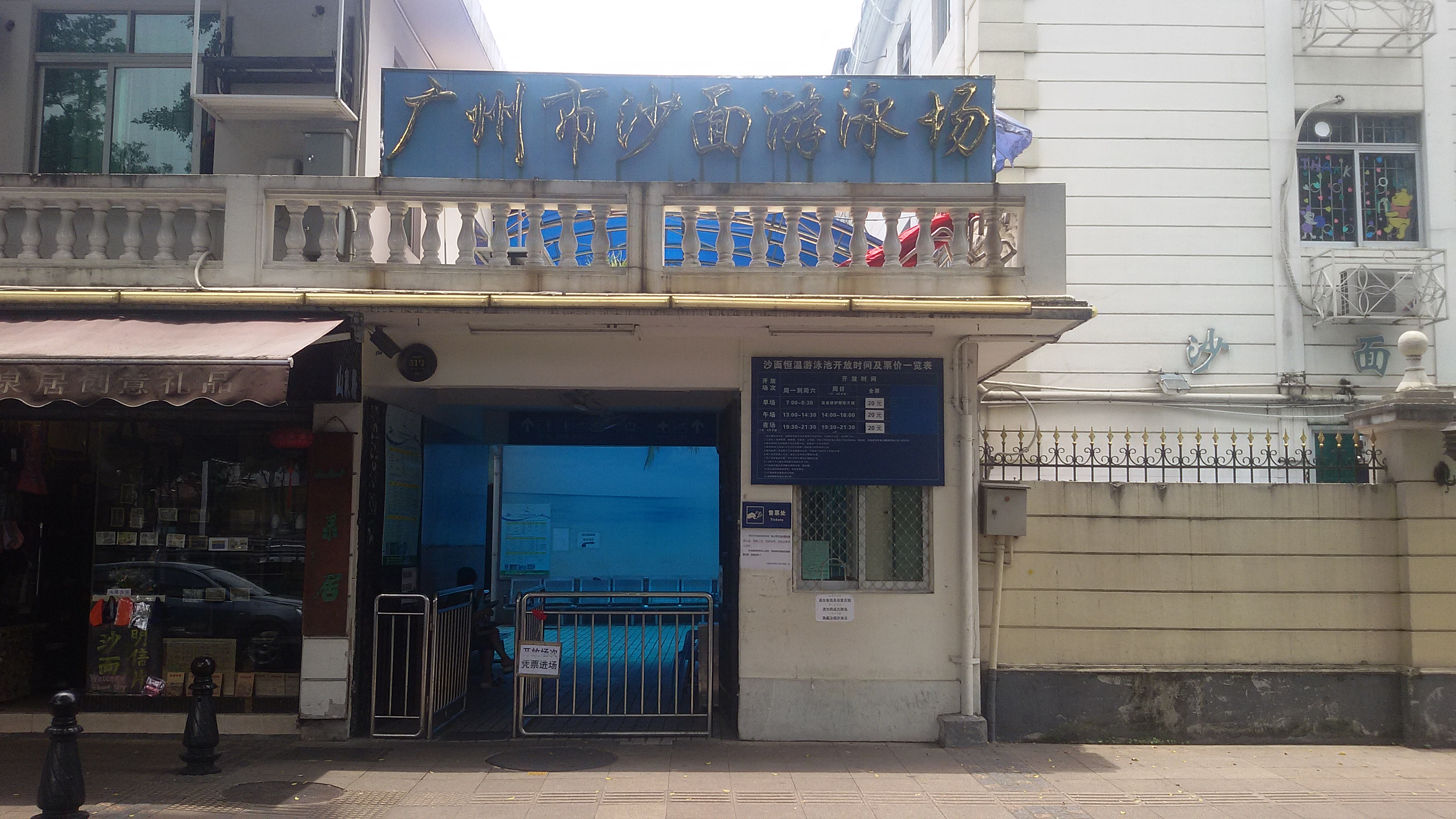 粵語: 沙面游水場